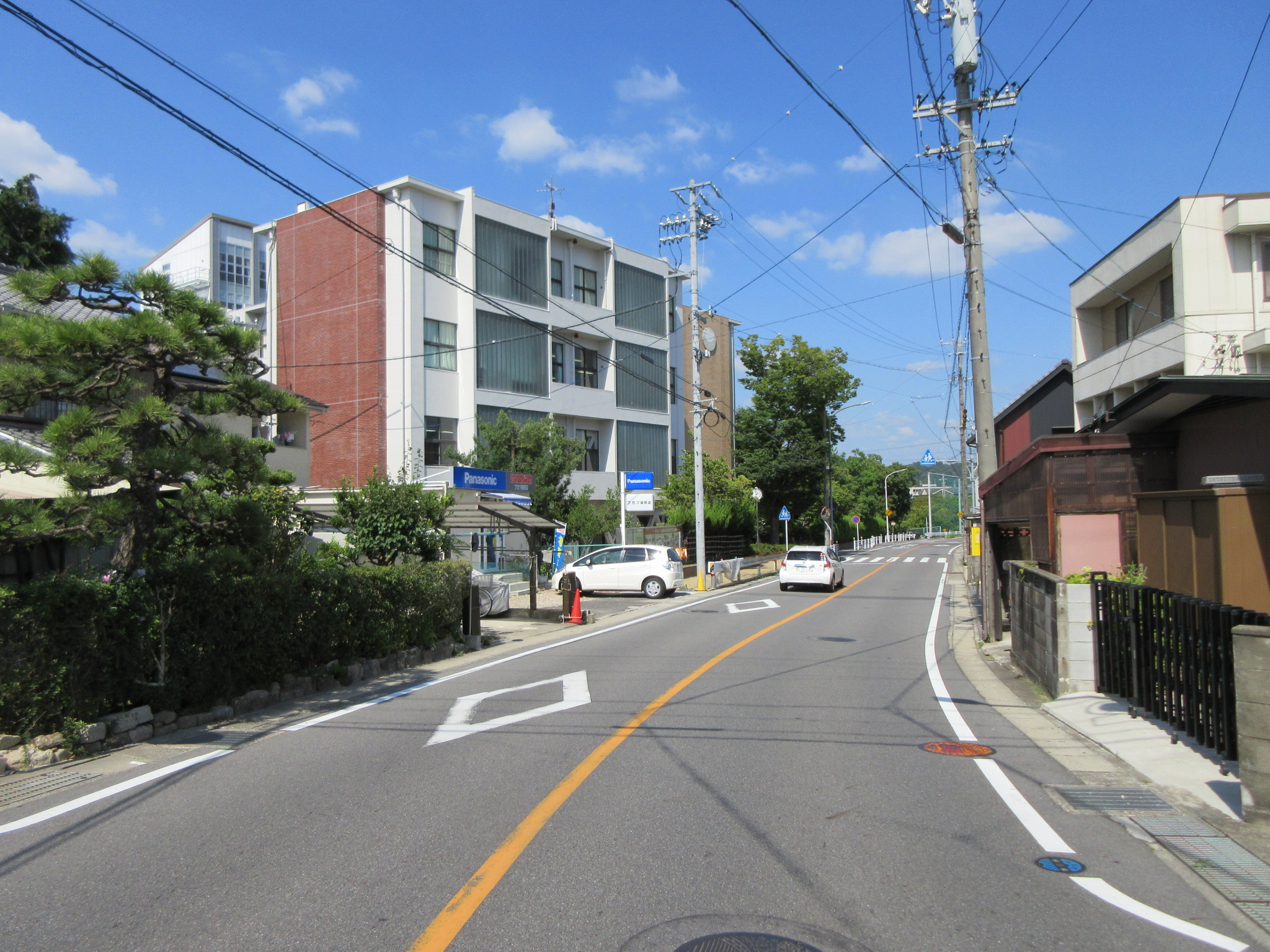 岡崎学園高等学校（岡崎市稲熊町）